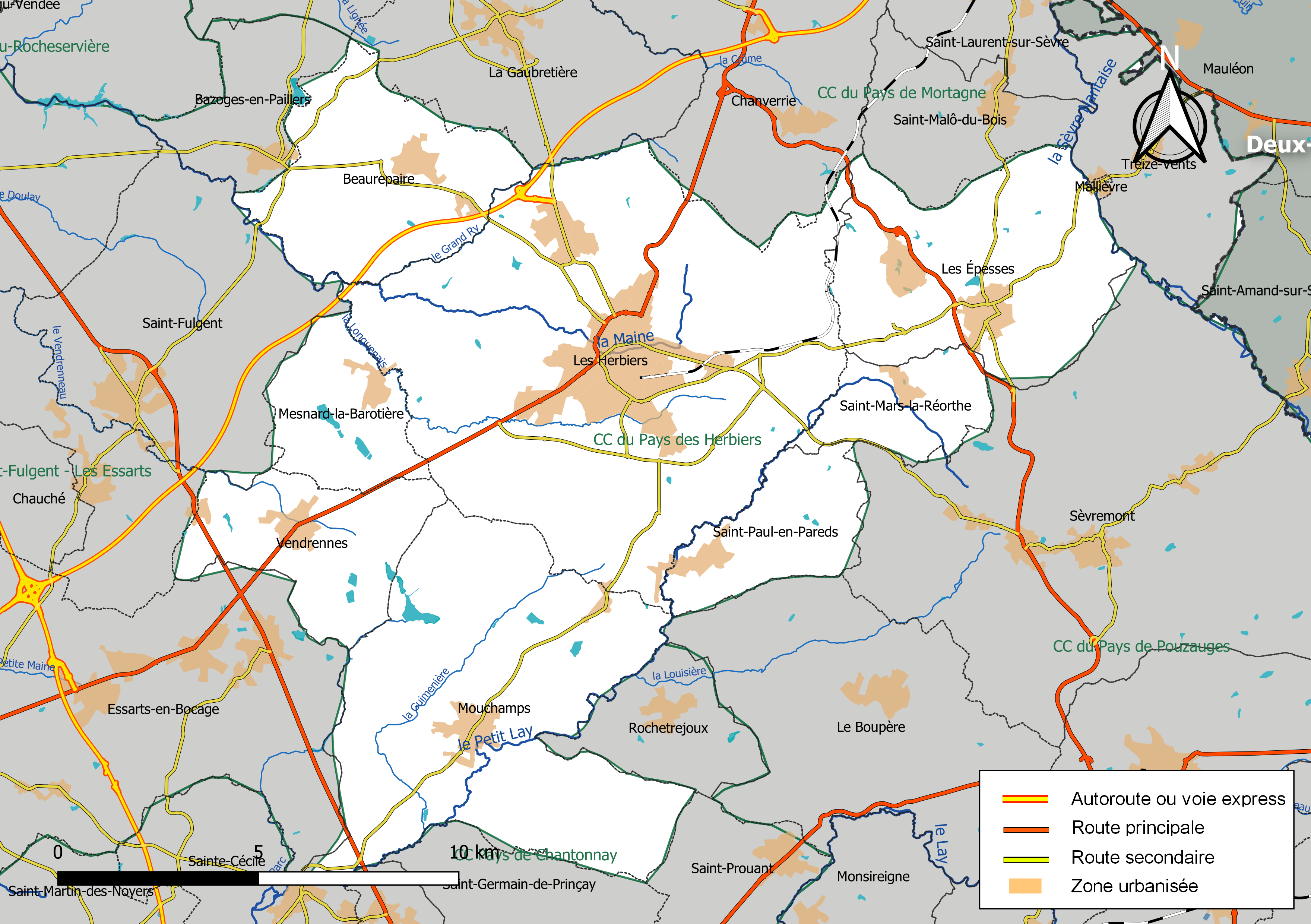 Carte géographique de la Communauté de communes du Pays des Herbiers, département de la Vendée, France. Composition au 1er janvier 2019.